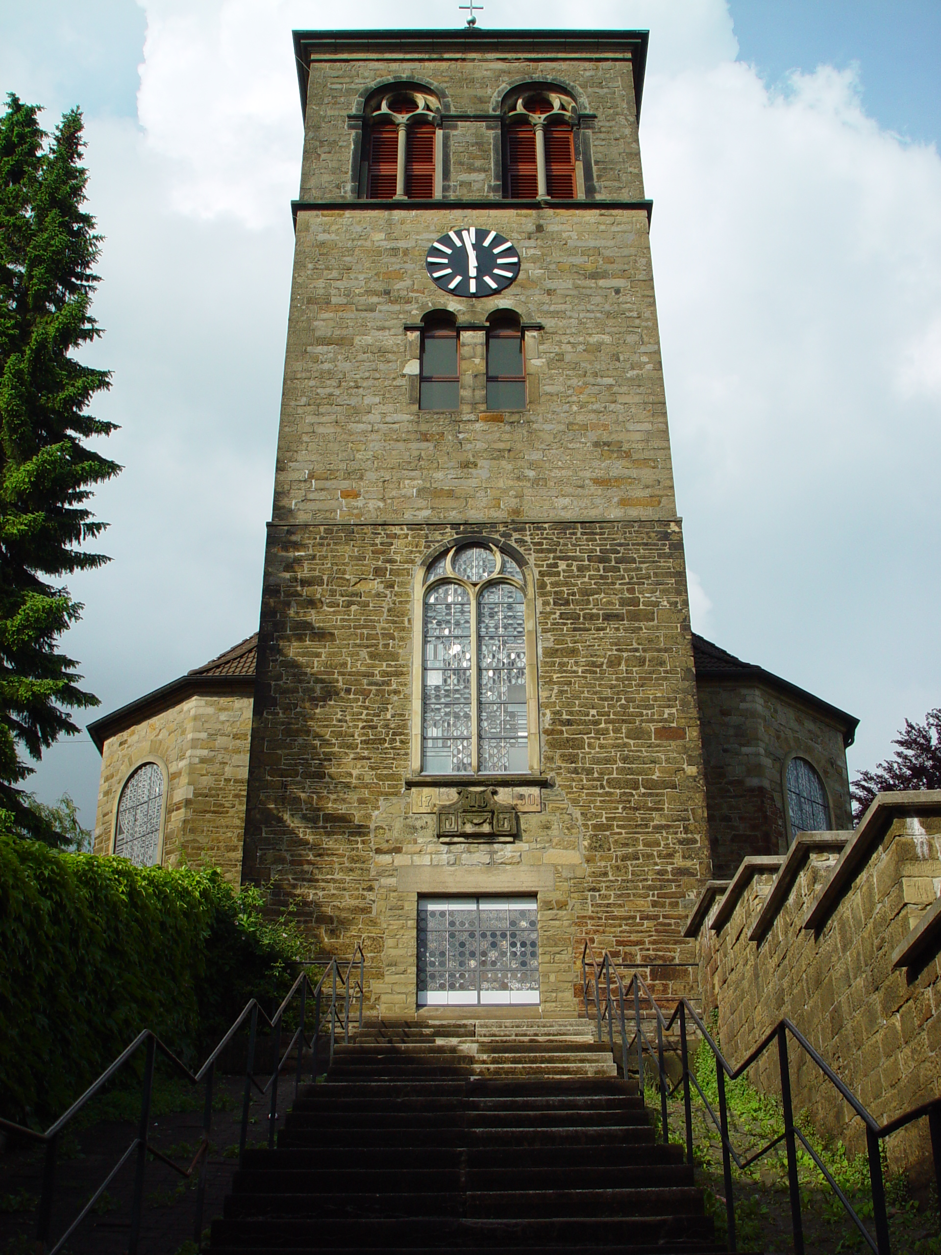 Lutherische Kirche Wuppertal-Ronsdorf